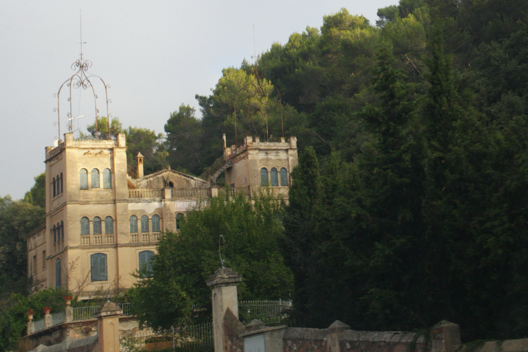 Pareras del Pla (Tagamanent)